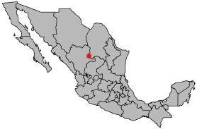 Locator map of Gómez Palacio, Durango, Mexico